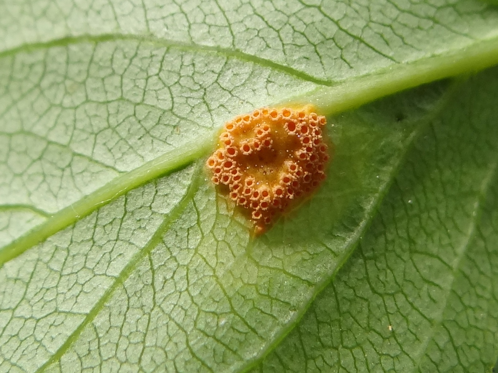 Puccinia coronata on leaf Rhamnus catharctica. Location: Poland, województwo małopolskie